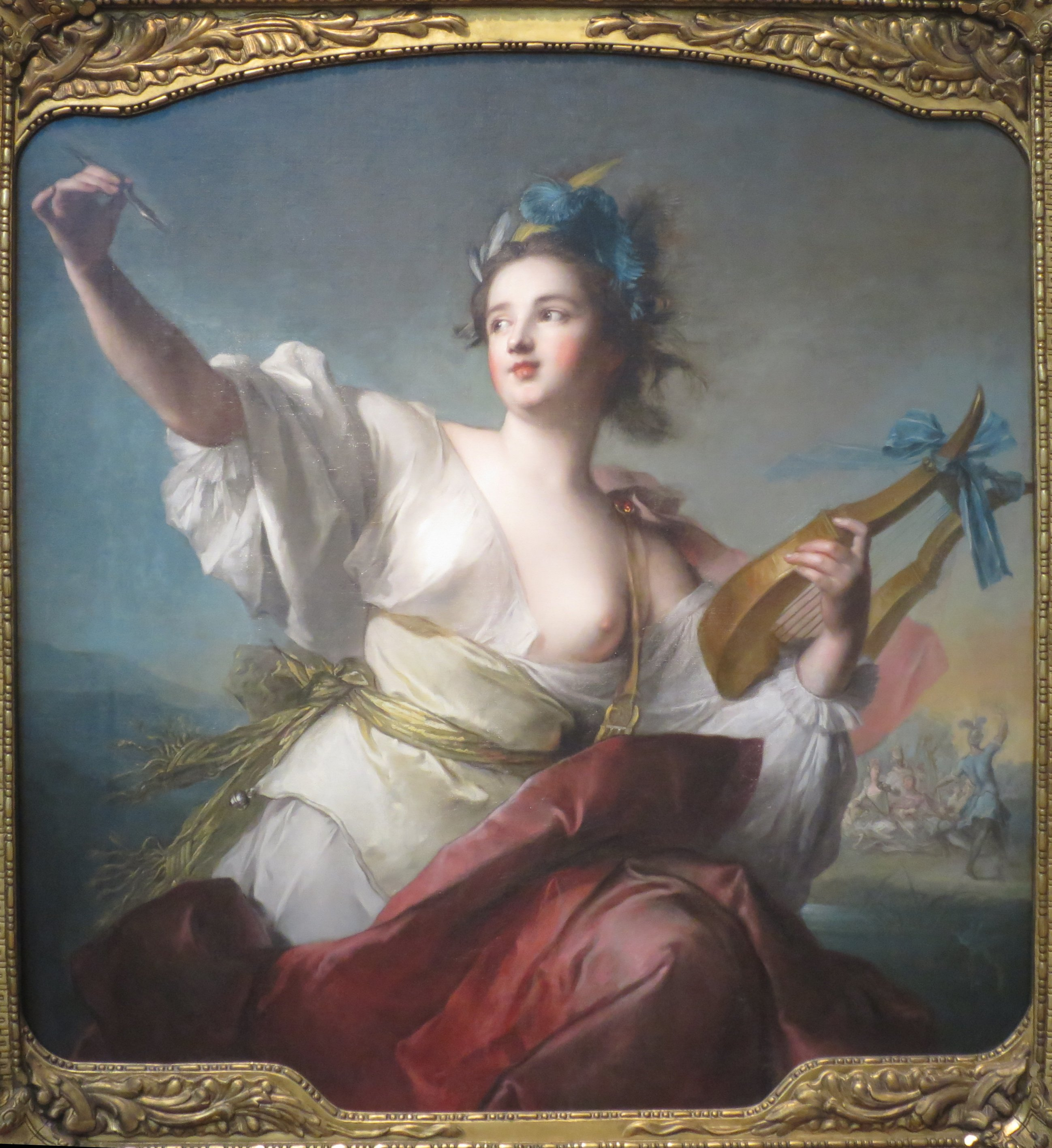 Musa da Dança